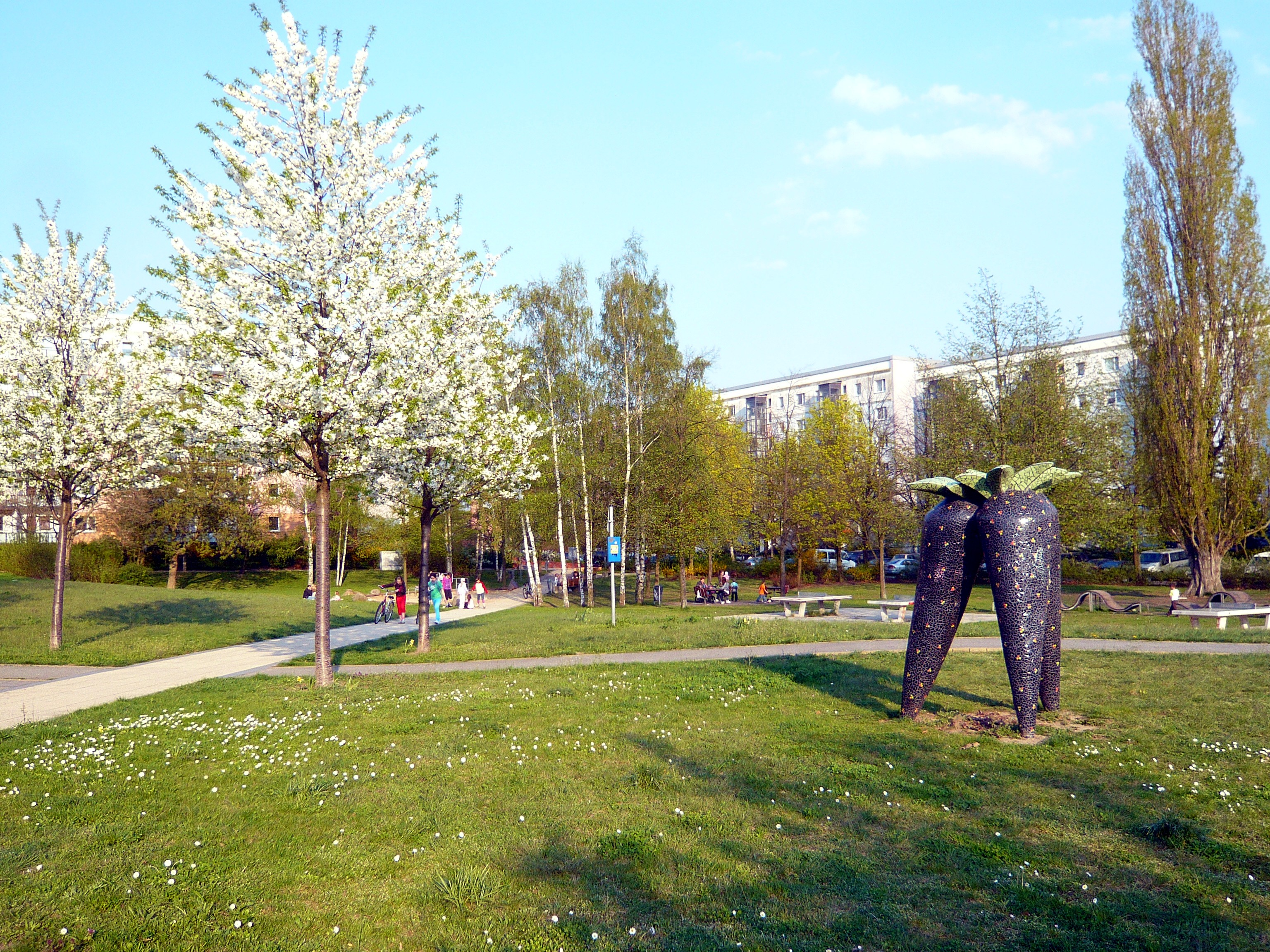 Ortsteil Berlin-Marzahn: Schwarzwurzel-Park an der gleichnamigen Straße